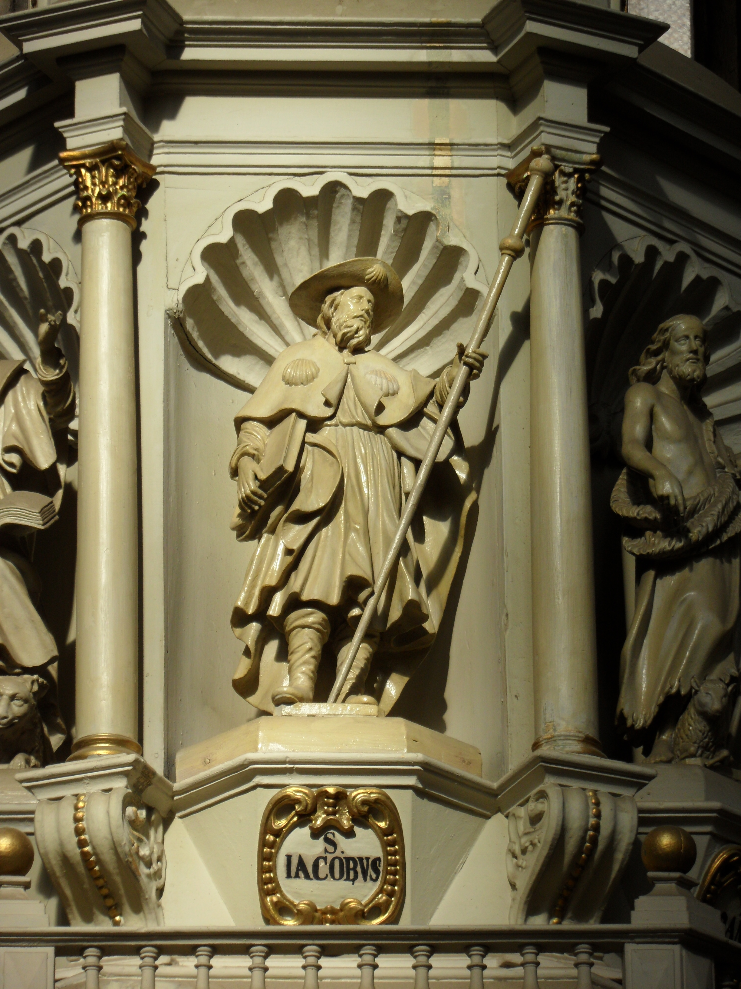 Socha sv. Jakuba na stříšce kazatelny - kostel sv. Jakuba, Brno